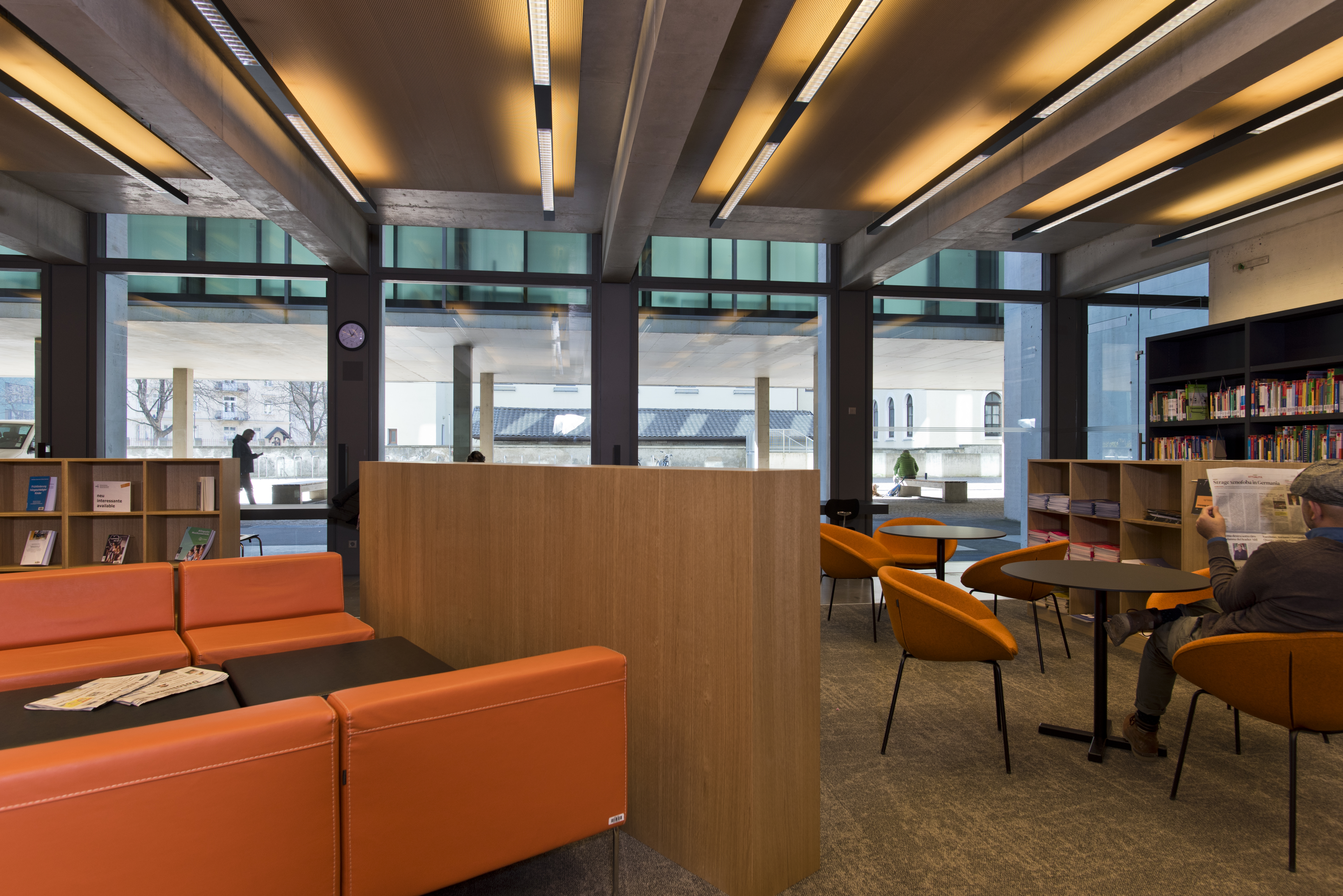 Innenansicht der Universitätsbibliothek in Brixen, mit Blick auf die Arbeitsplätze und Bücherregale